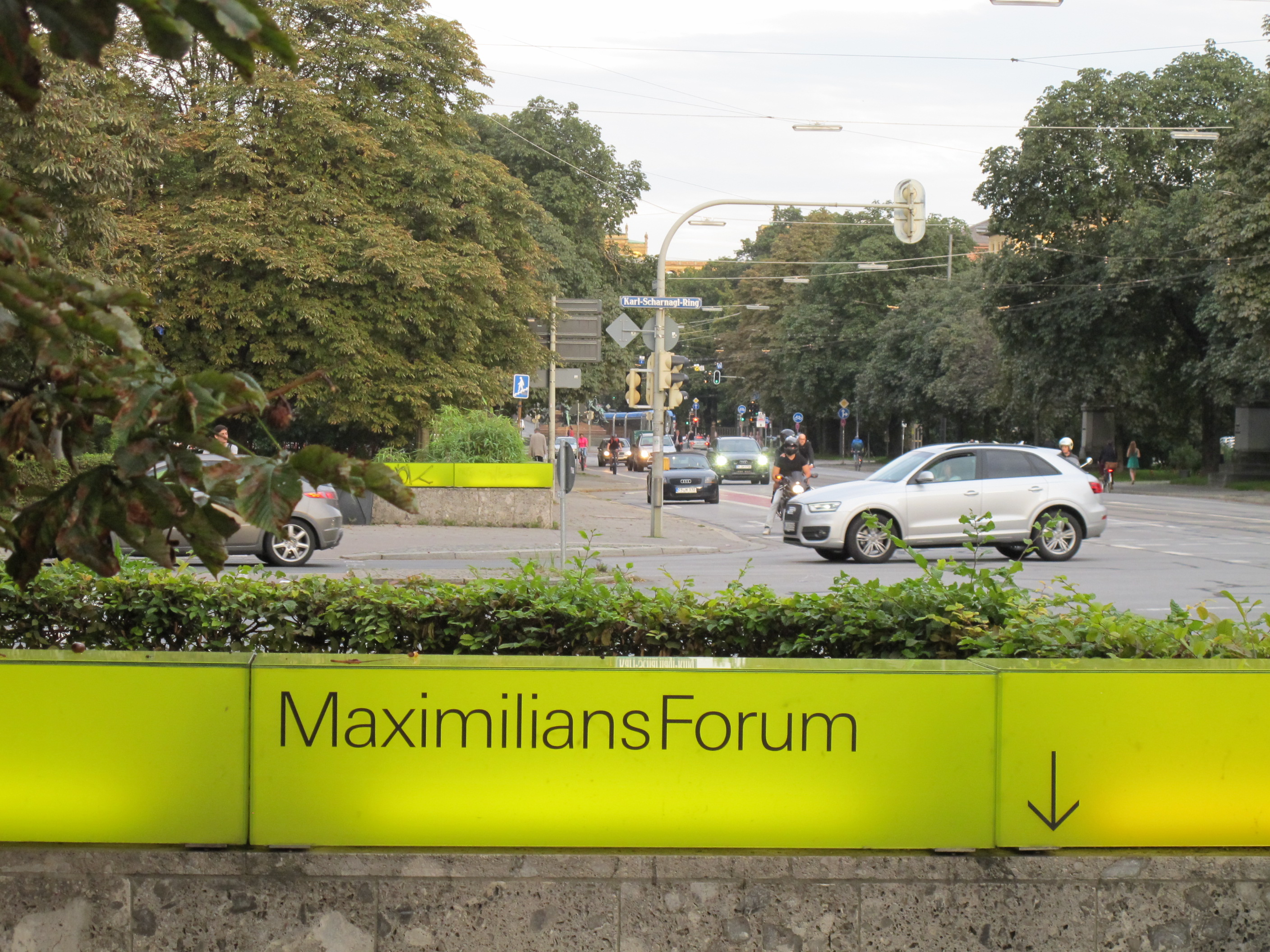 Maximiliansforum Semptember 2014